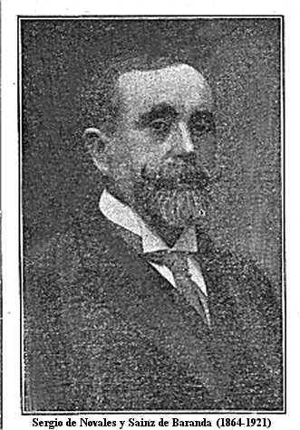 Sergio de Novales y Sainz de Baranda (7.10.1864 - 11.6.1921), ingegniere agrario, ricco proprietario terriero, deputato, direttore del periodico "El Progreso Agricula y Pecuario" di Madrid.